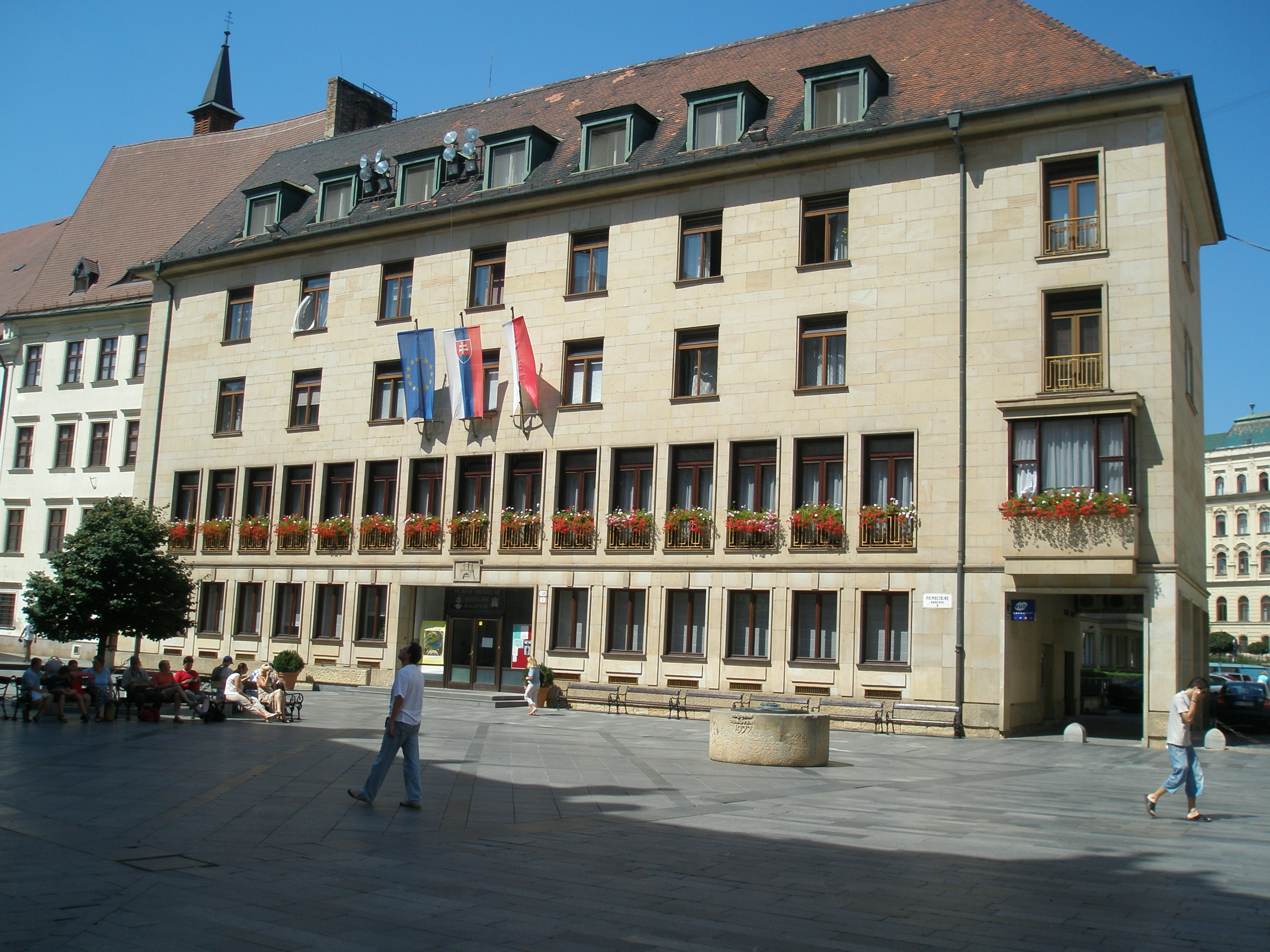 Budova bratislavského magistrátu